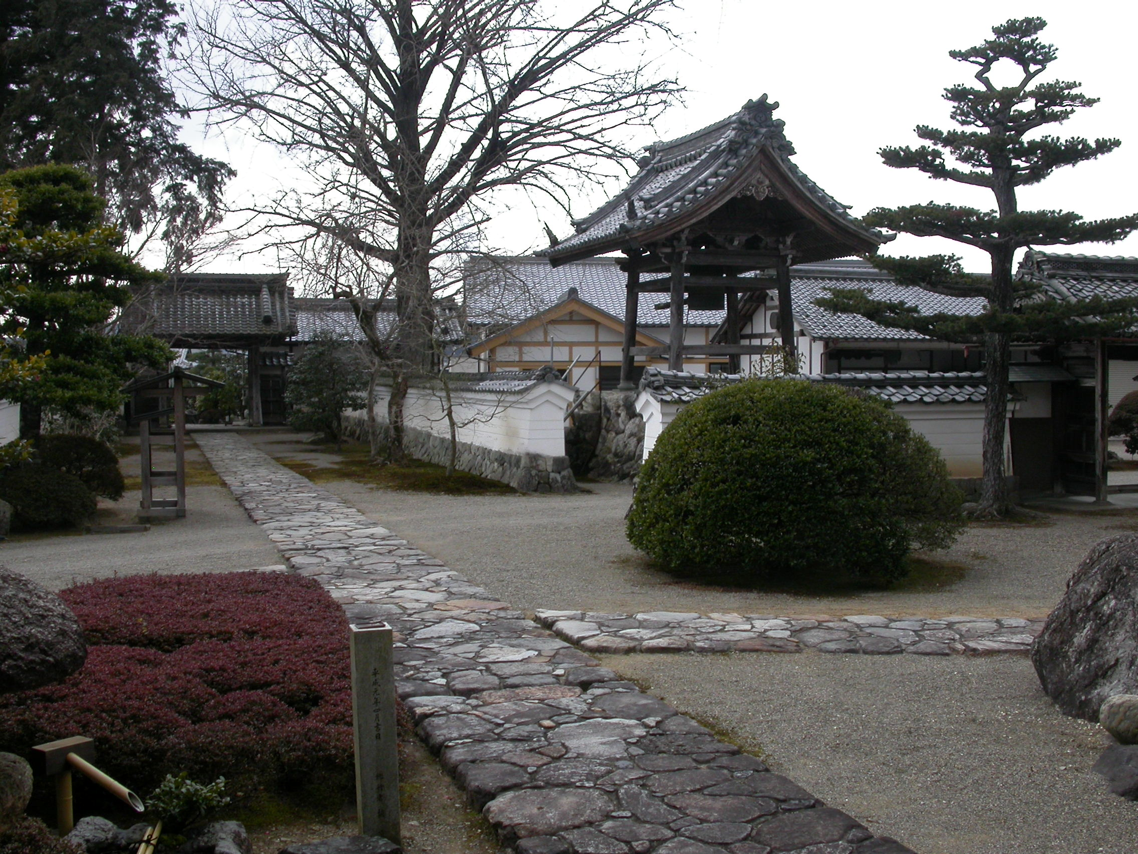 南の山門を望む